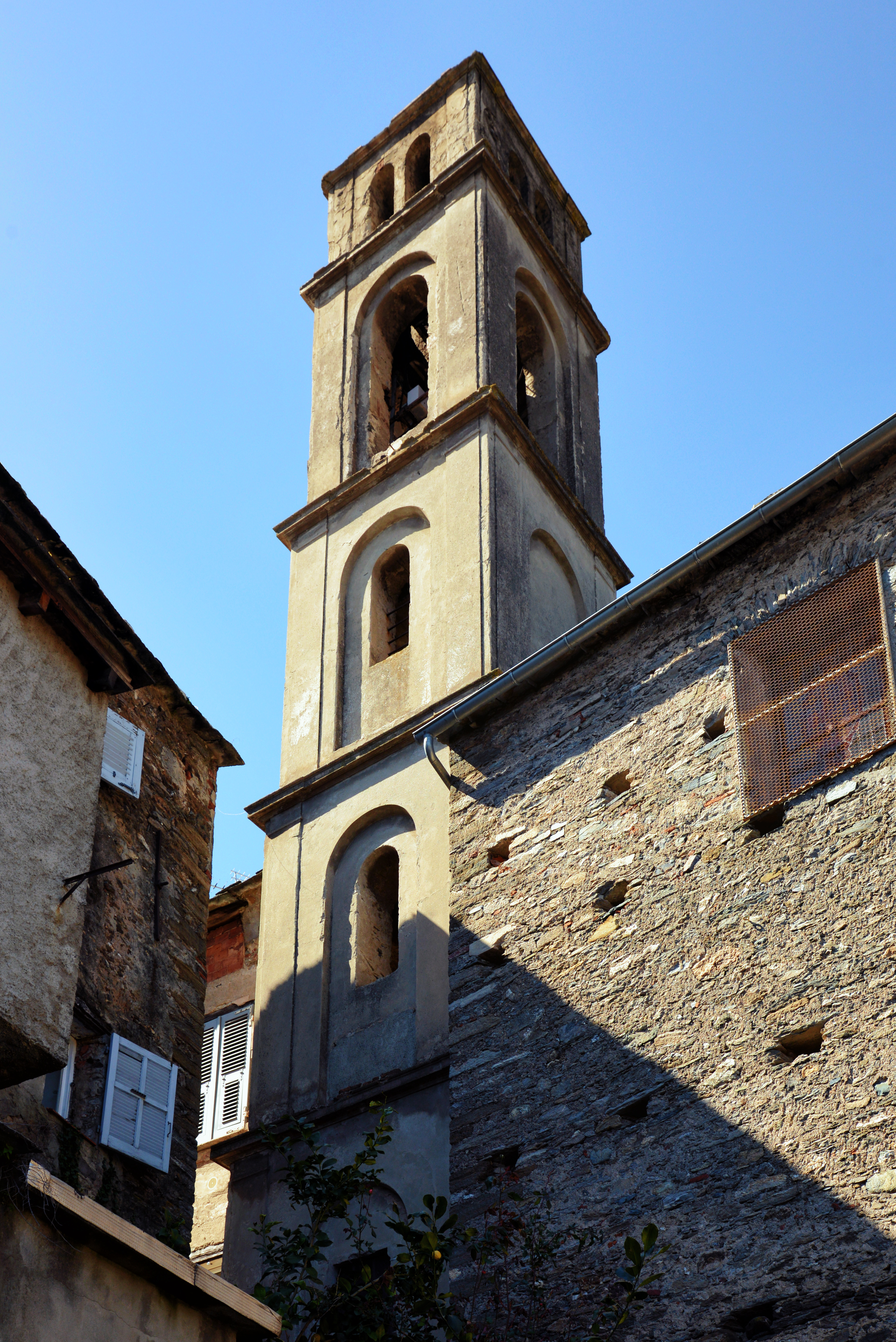 Vescovato, Casinca (Corse) - Clocher de l'église Saint-Martin (San Martinu)